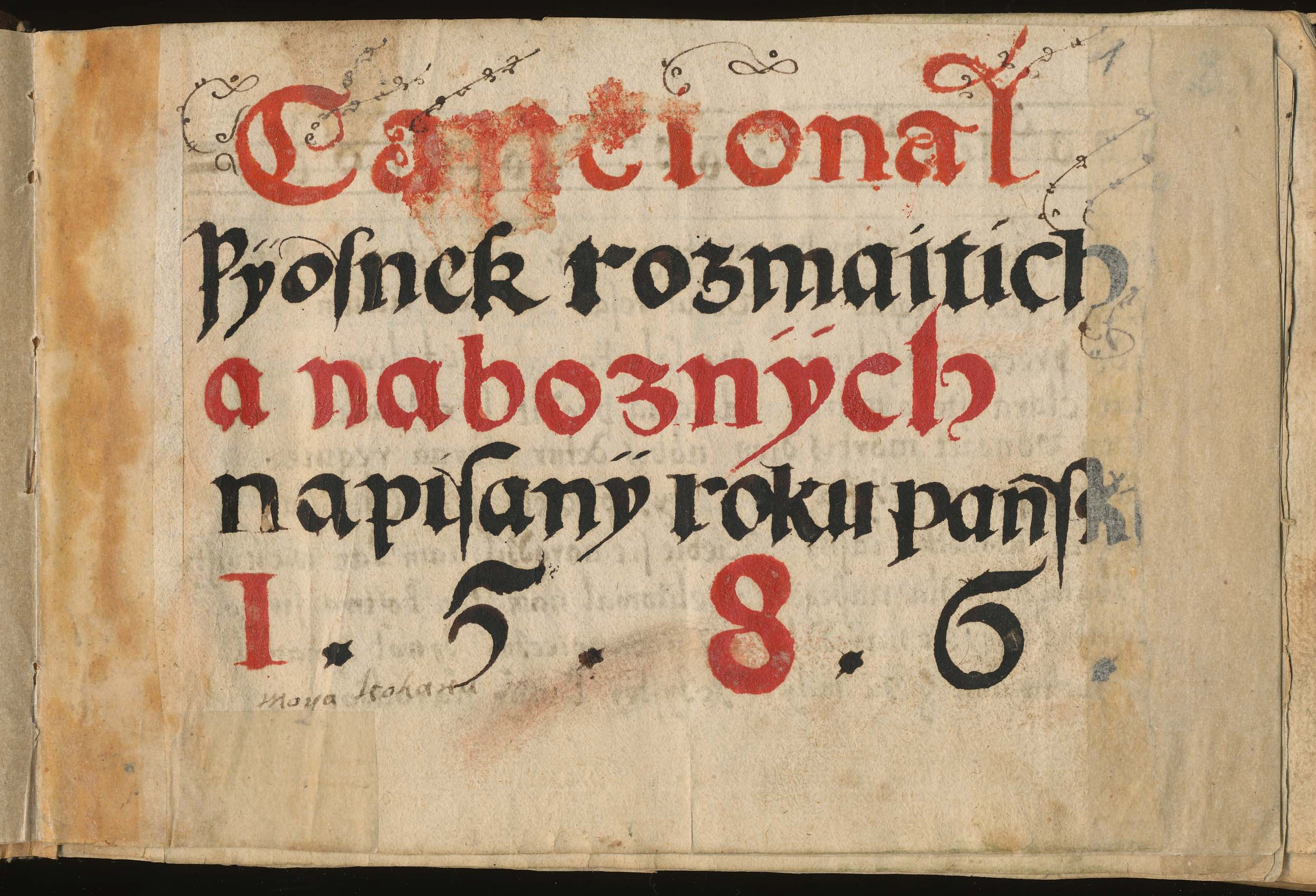 Karta tytułowa kancjonału Teodory Taranowskiej, 1586 rok (Kancjonał A, Opactwo Mniszek Benedyktynek w Staniątkach).